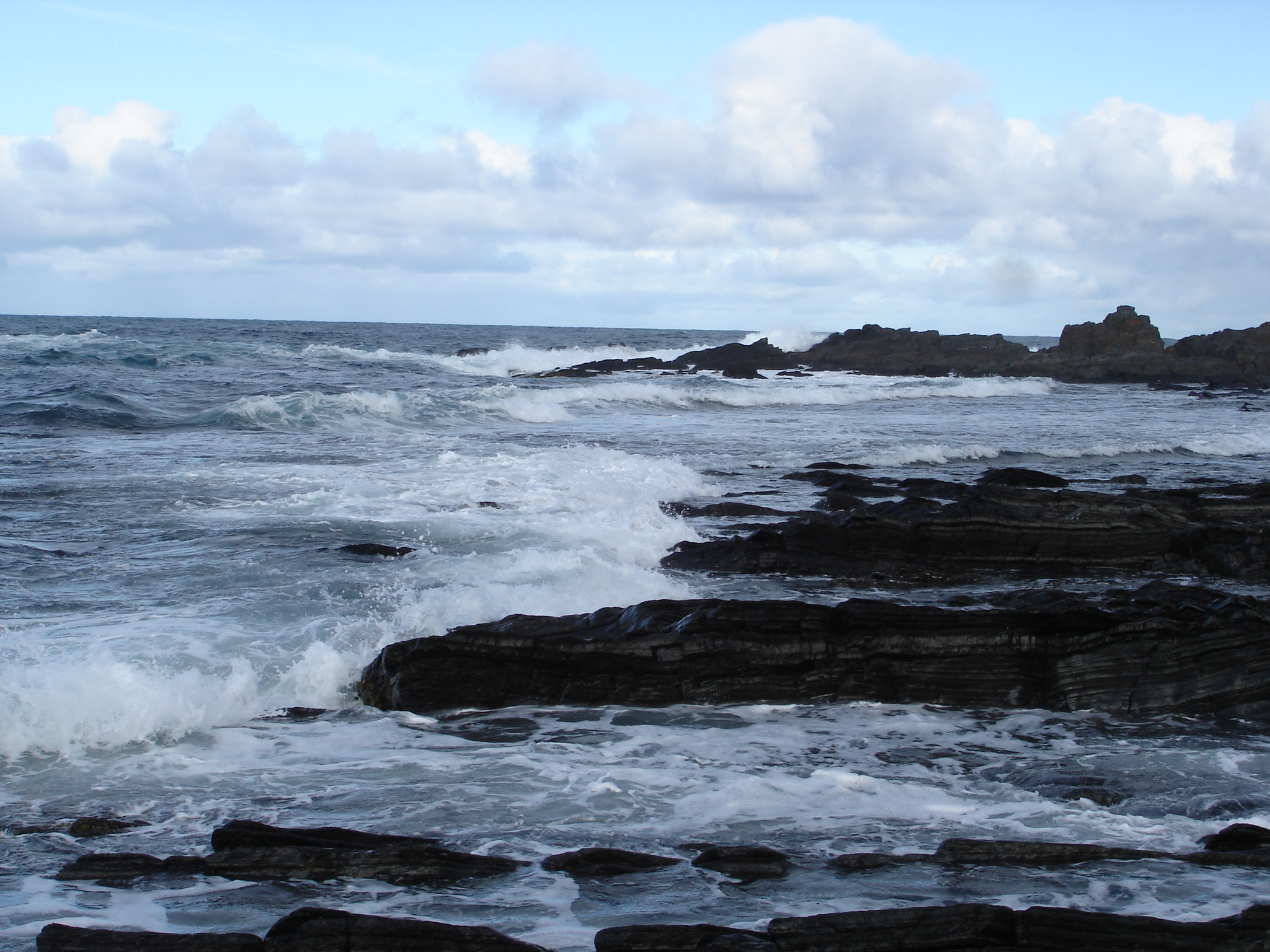 На берегу Баренцева моря